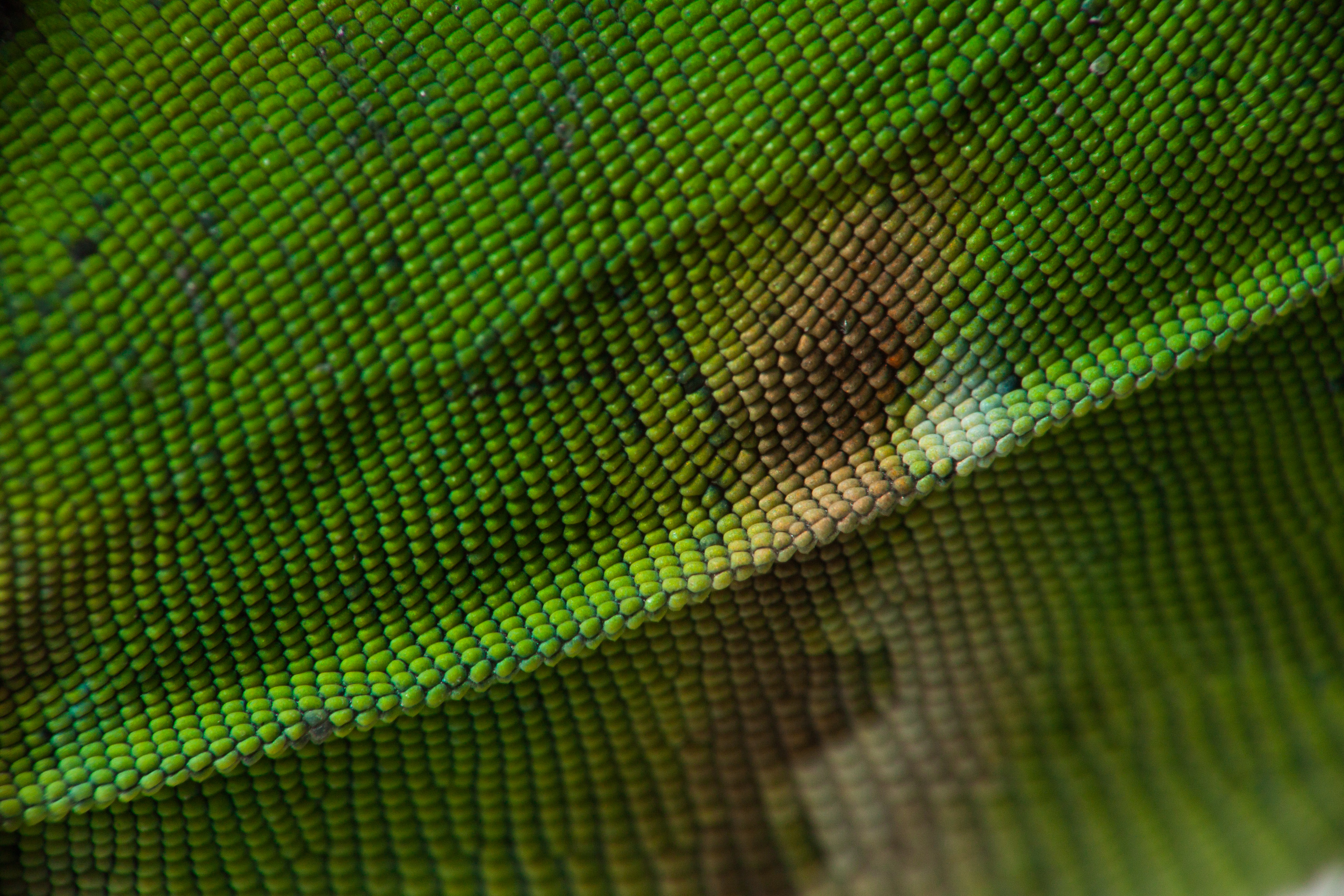 Escamas de juvenil de iguana verde